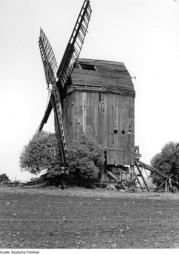 Original image description from the Deutsche Fotothek Wolmirstedt. Auerbachs Mühle, Bockmühle, Baujahr 1842